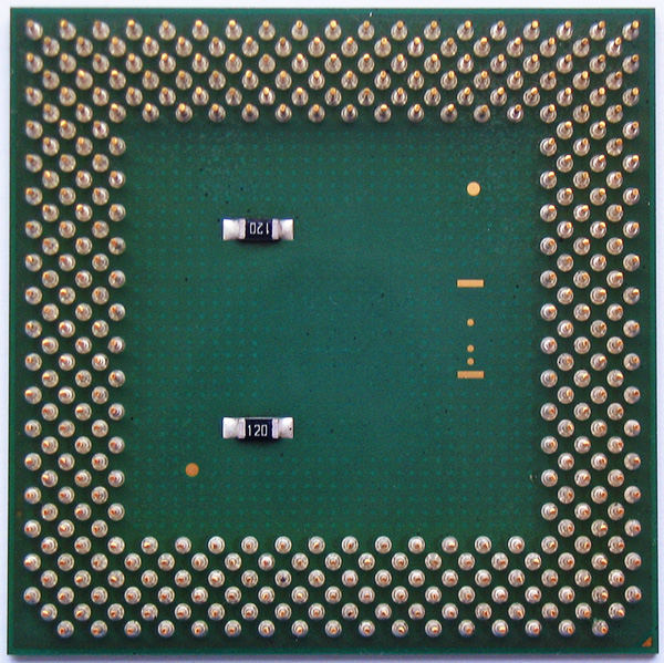 Beschreibung: Celeron "Coppermine 128" 600 MHz / Backside Fotograf: Darkone, 26. Juni 2005